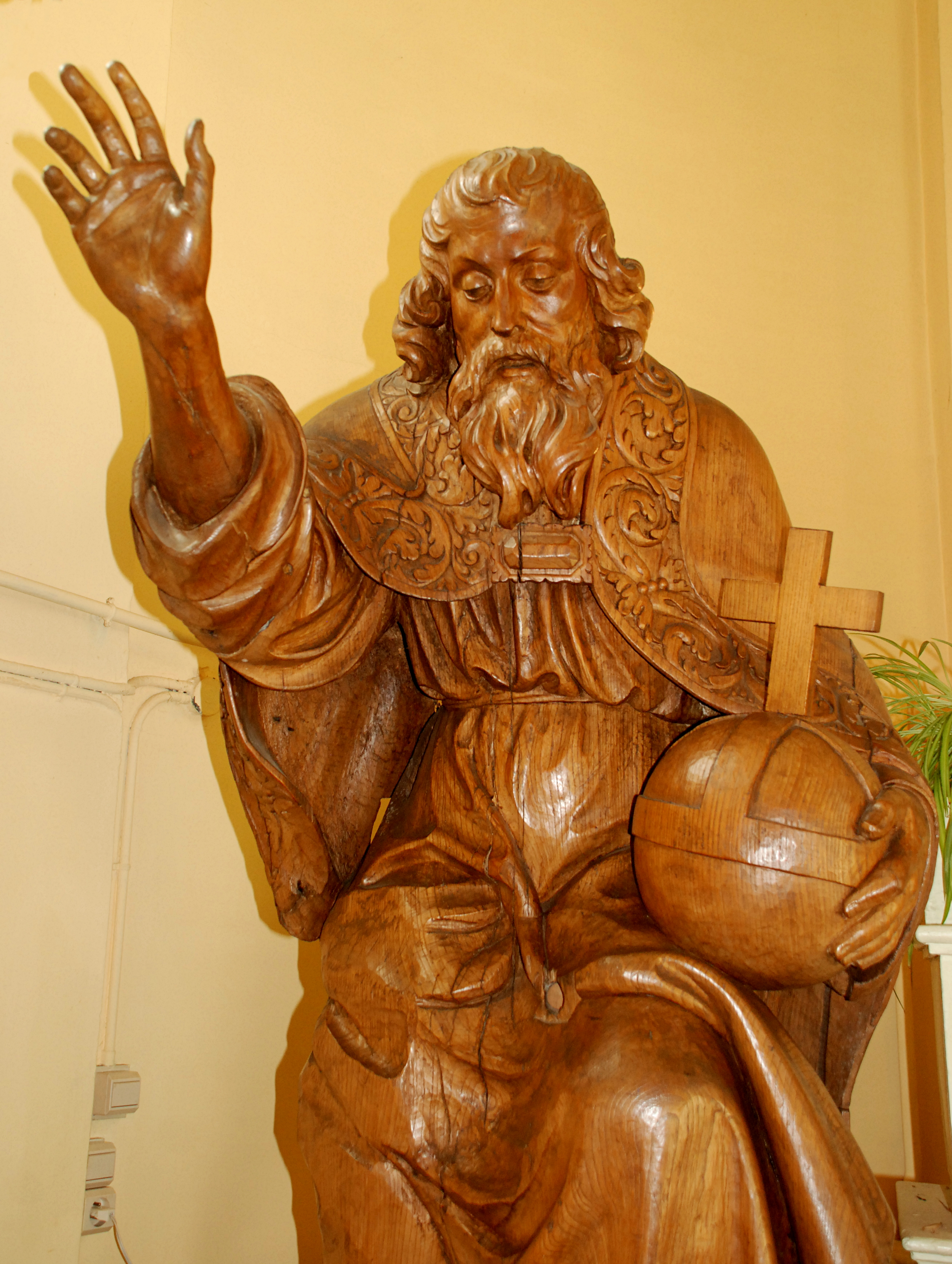 Belgique - Brabant wallon - Mont-Saint-Guibert - Église Saint-Guibert - statuaire baroque provenant de l'ancienne église des Augustins de Bruxelles (désacralisée en 1842)